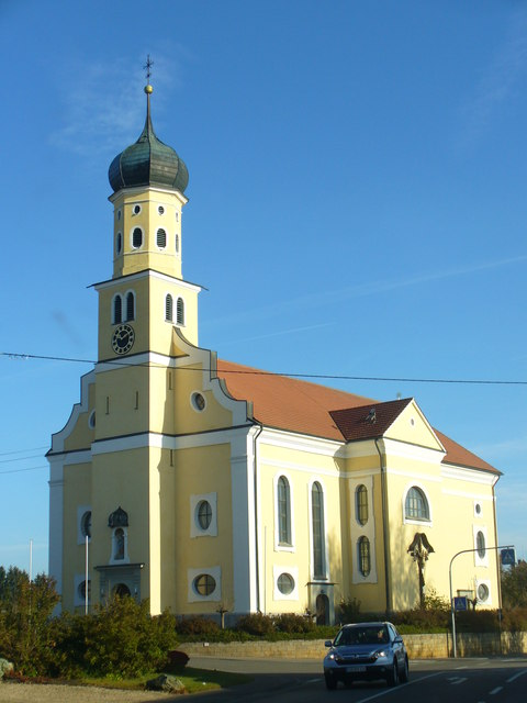 Pfarrkirche Engelswies